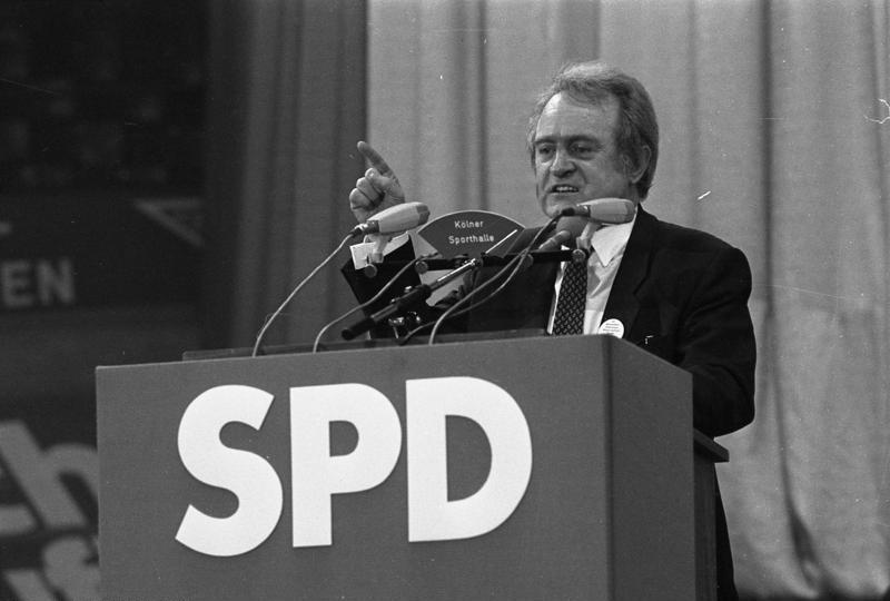 28.2.1983 SPD-Wahlkundgebung mit Kanzler-Kandidat Dr. Hans-Jochen Vogel in der Kölner Sporthalle